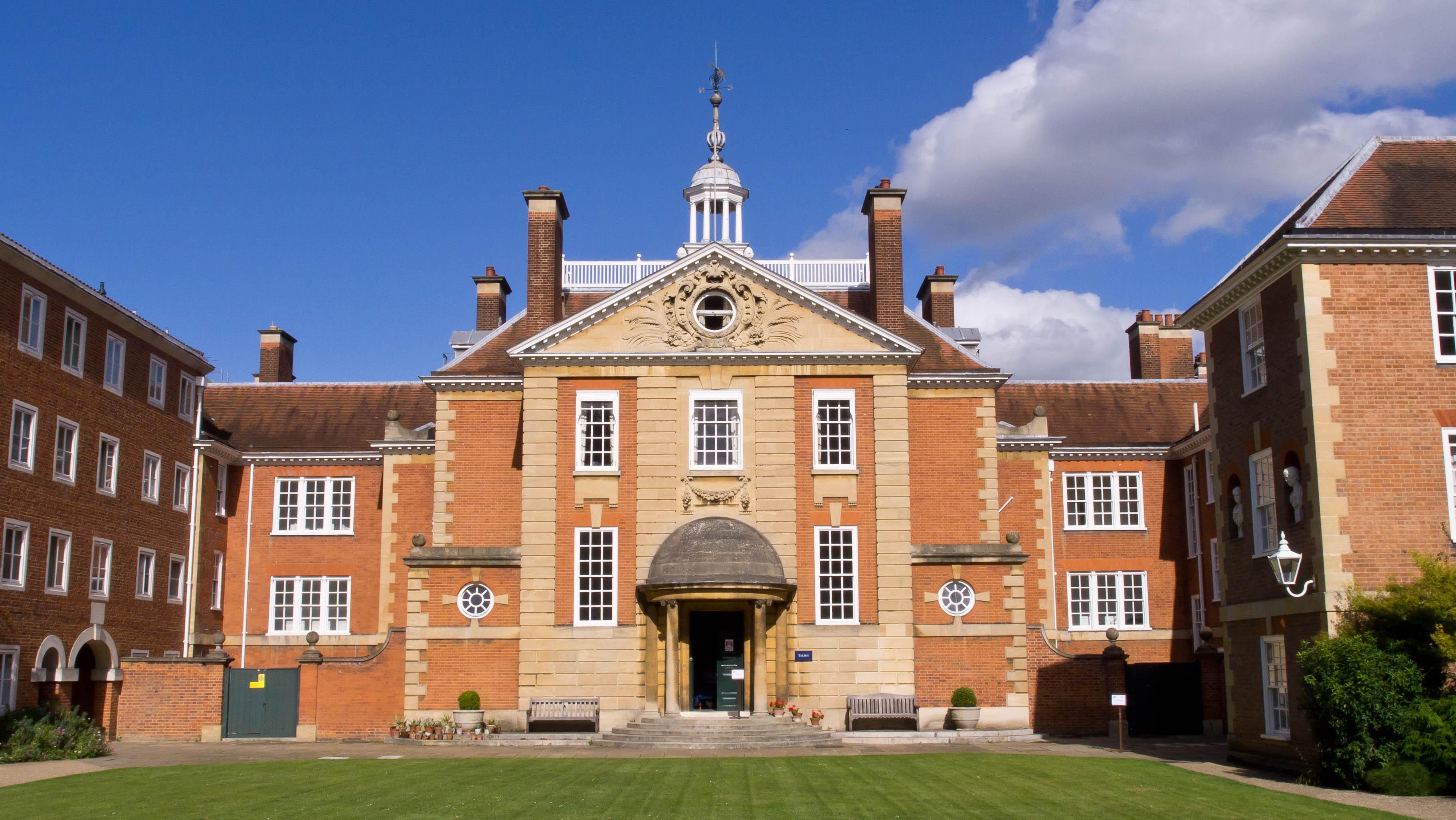 Lady Margaret Hall